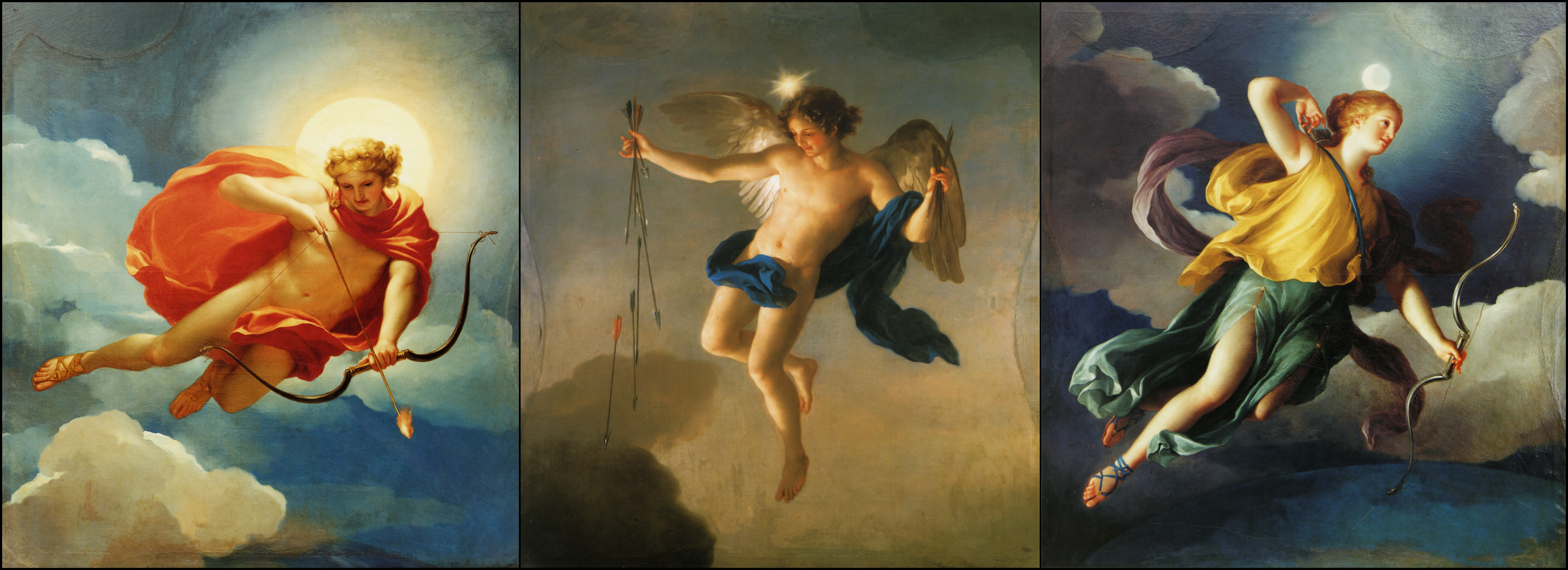 Personifikasi tiga bagian hari dalam mitologi Yunani